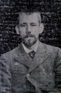 Draguerrotipo de Adolfo Vienrich (circa 1900)